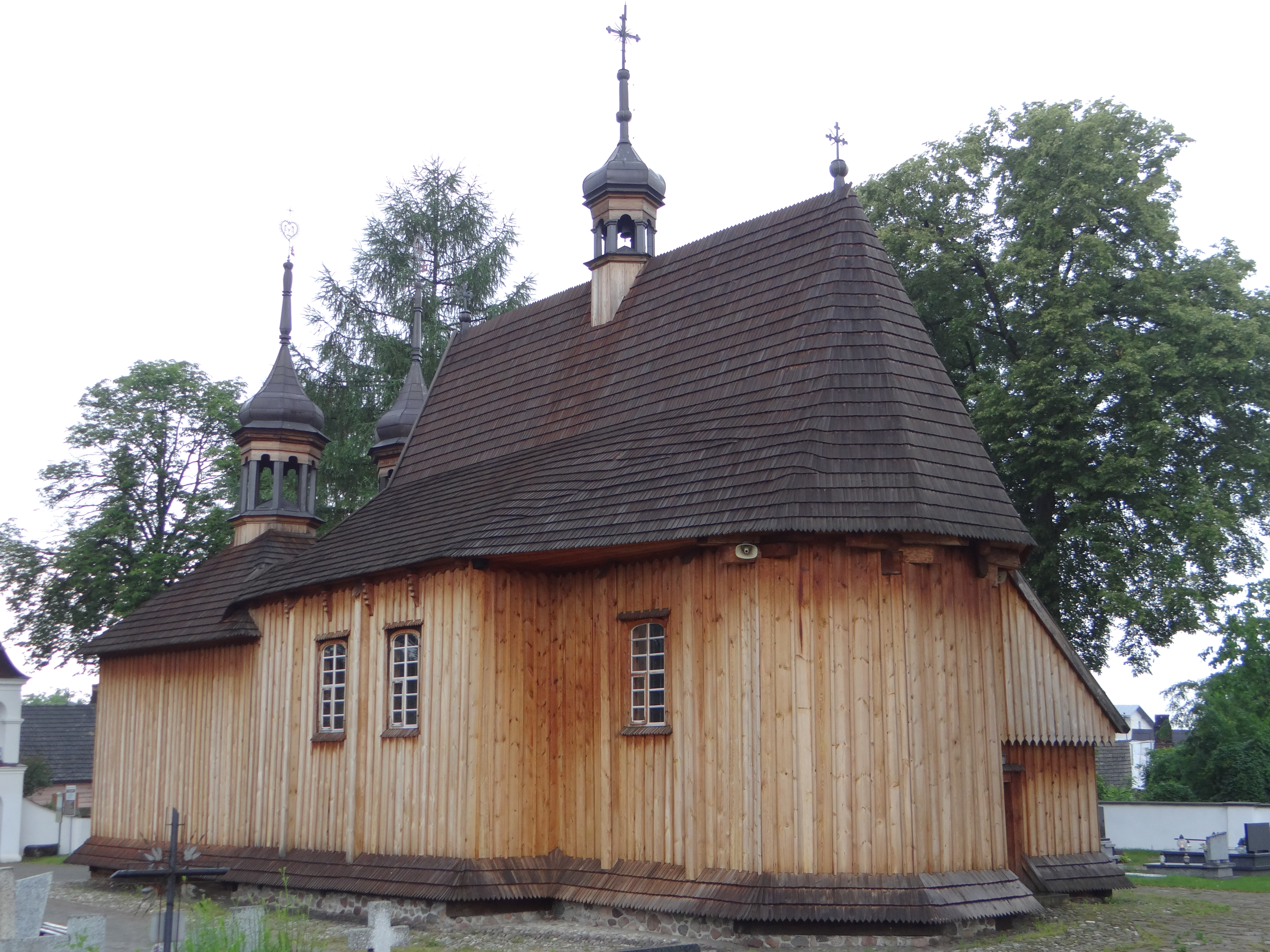 Zdjęcie wykonane w okolicy kościoła św. Trójcy w Ulanowie.